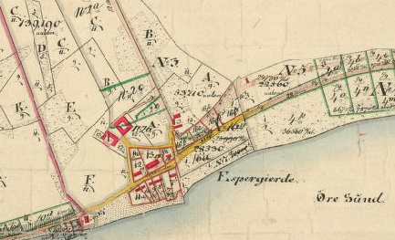 Espergærde 1860